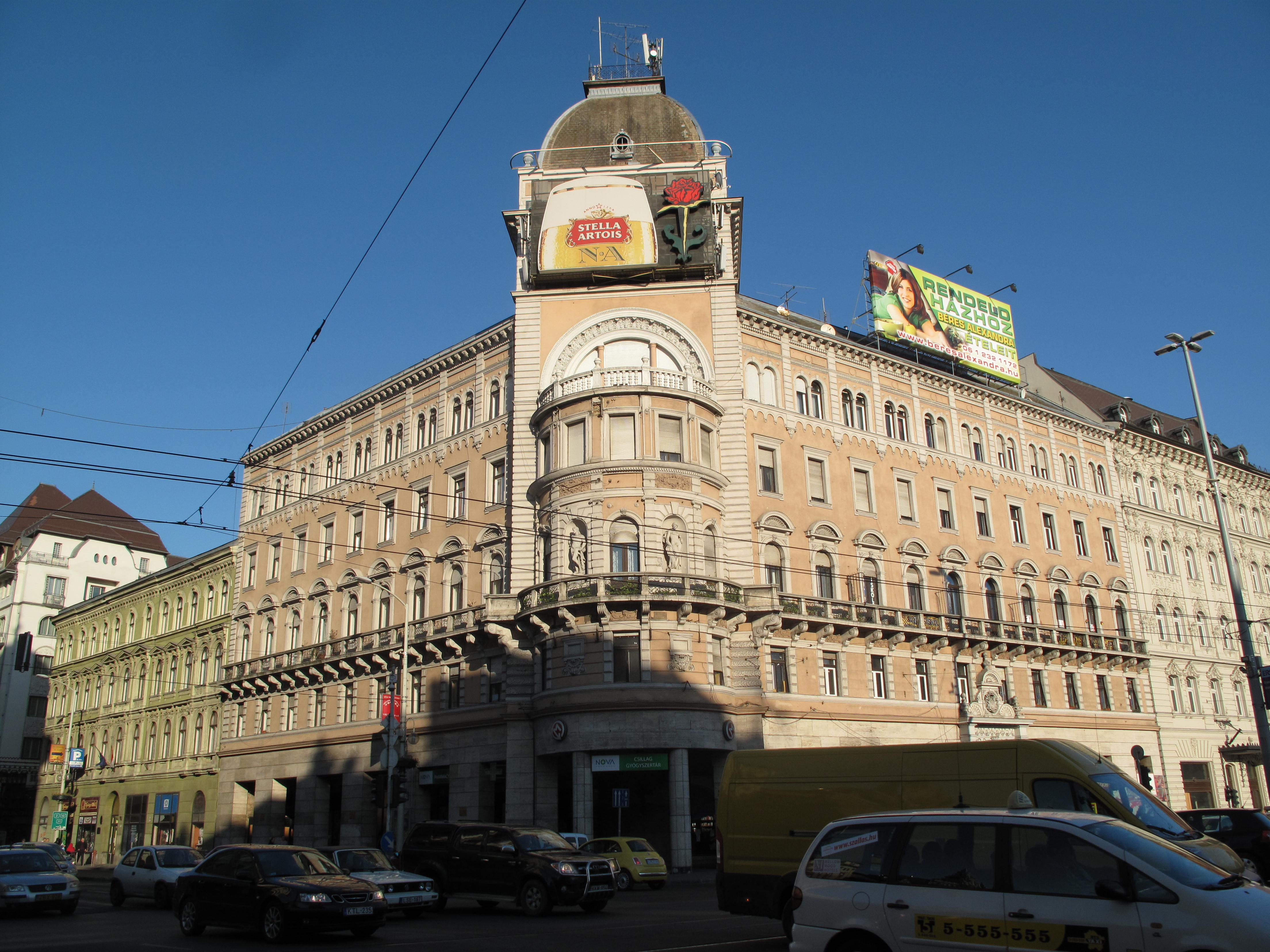 Budapešť